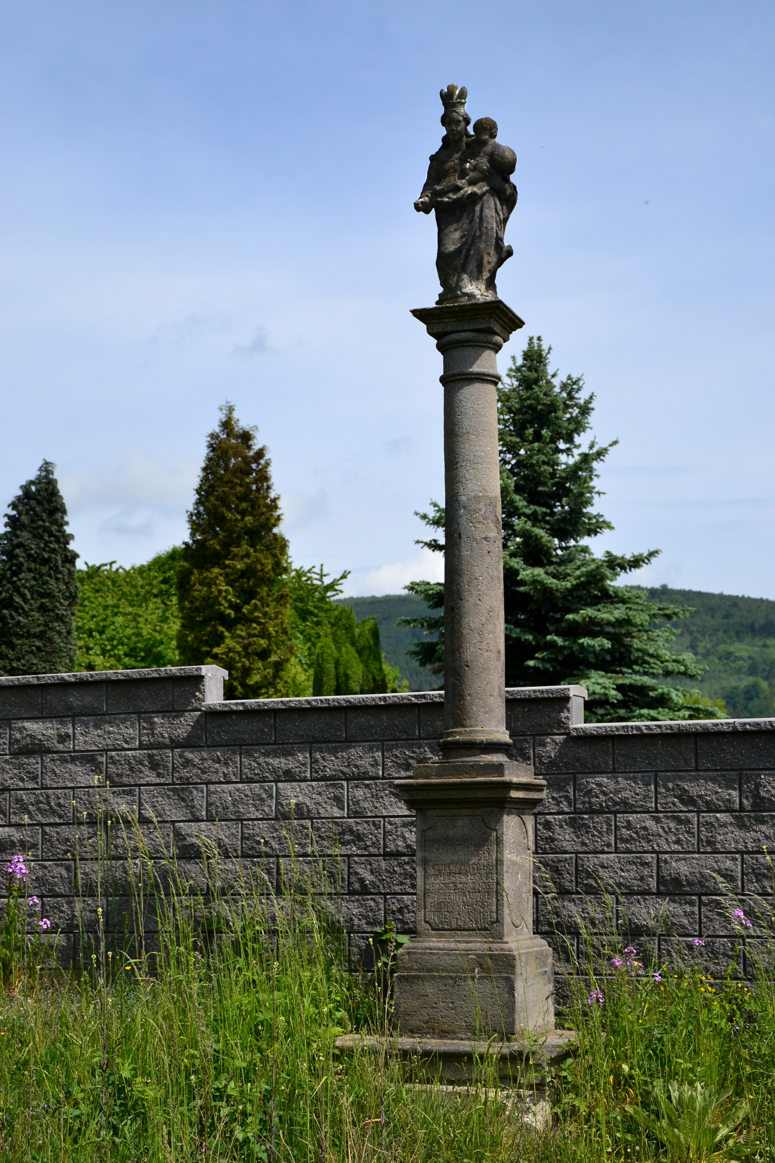 Mariánský sloup přemístěný ze zaniklých Račic ke hřbitovní zdi v Místě